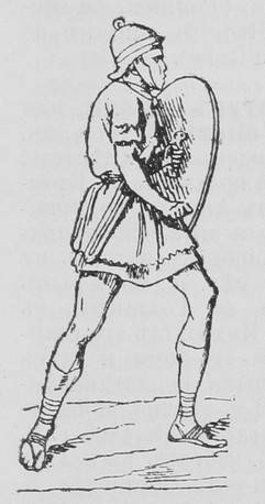 Данное изображение было использовано в статье «Велиты» опубликованной в пятом томе «Военной энциклопедии», который был издан книгоиздательским товариществом Ивана Дмитриевича Сытина в 1911 году в столице Российской империи городе Санкт-Петербурге.